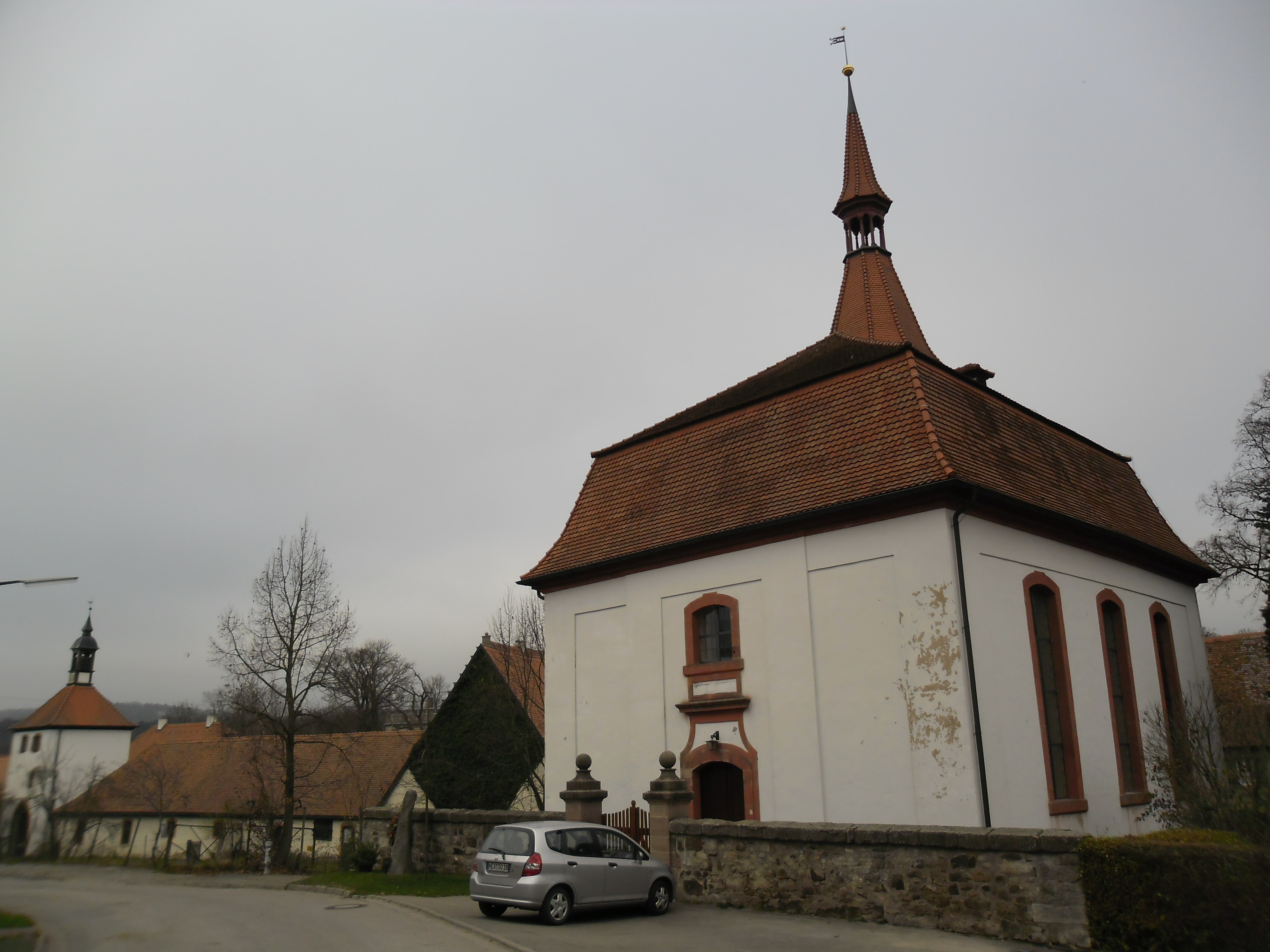 Ansichten aus Unternzenn mit dem Schloss, der Pfarrkirche St. Maria, dem ehemaligen Schulhaus und dem Gasthaus "Goldener Löwe"